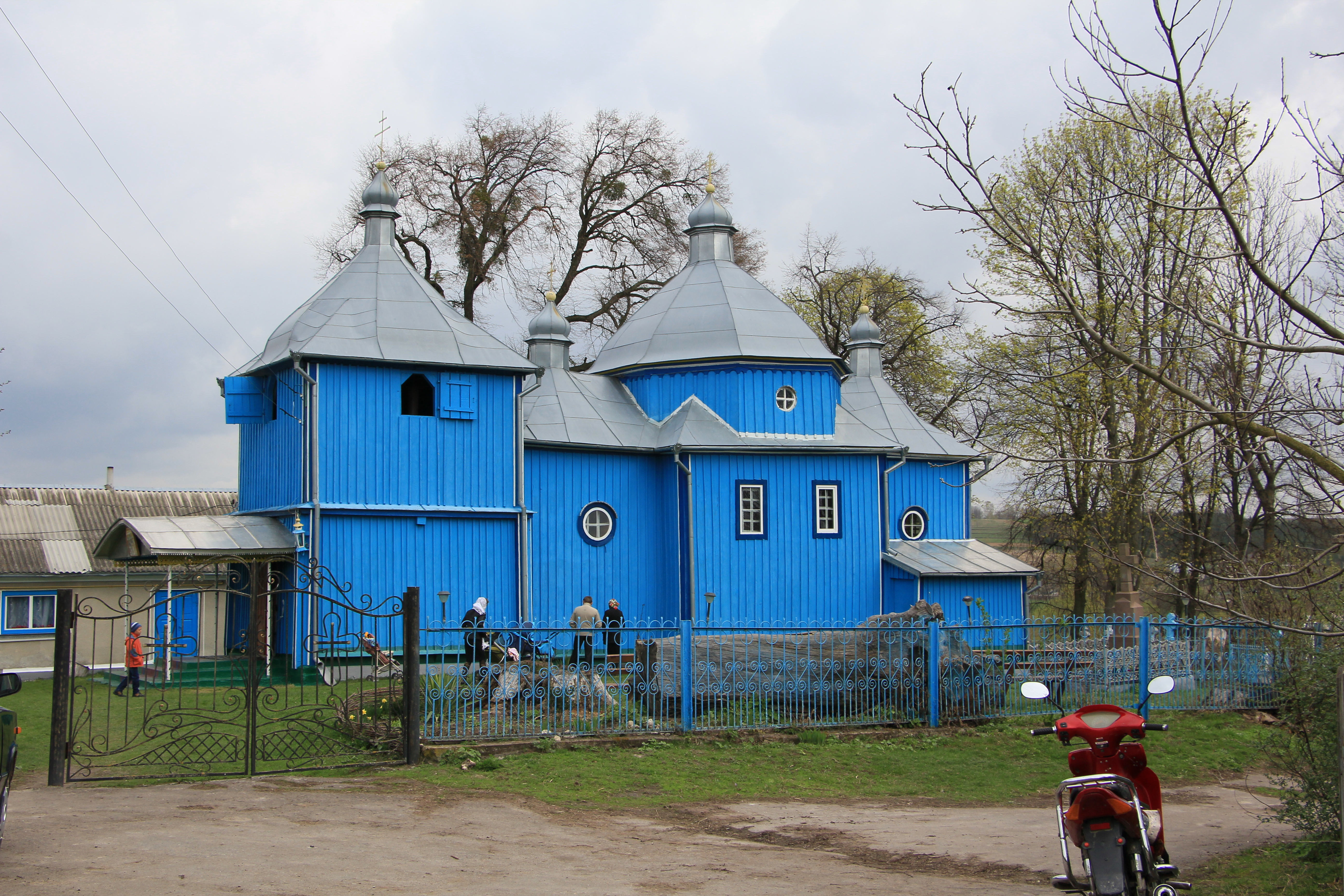 Дерев'яна церква в селі Попівці Кременецького району Тернопільської області